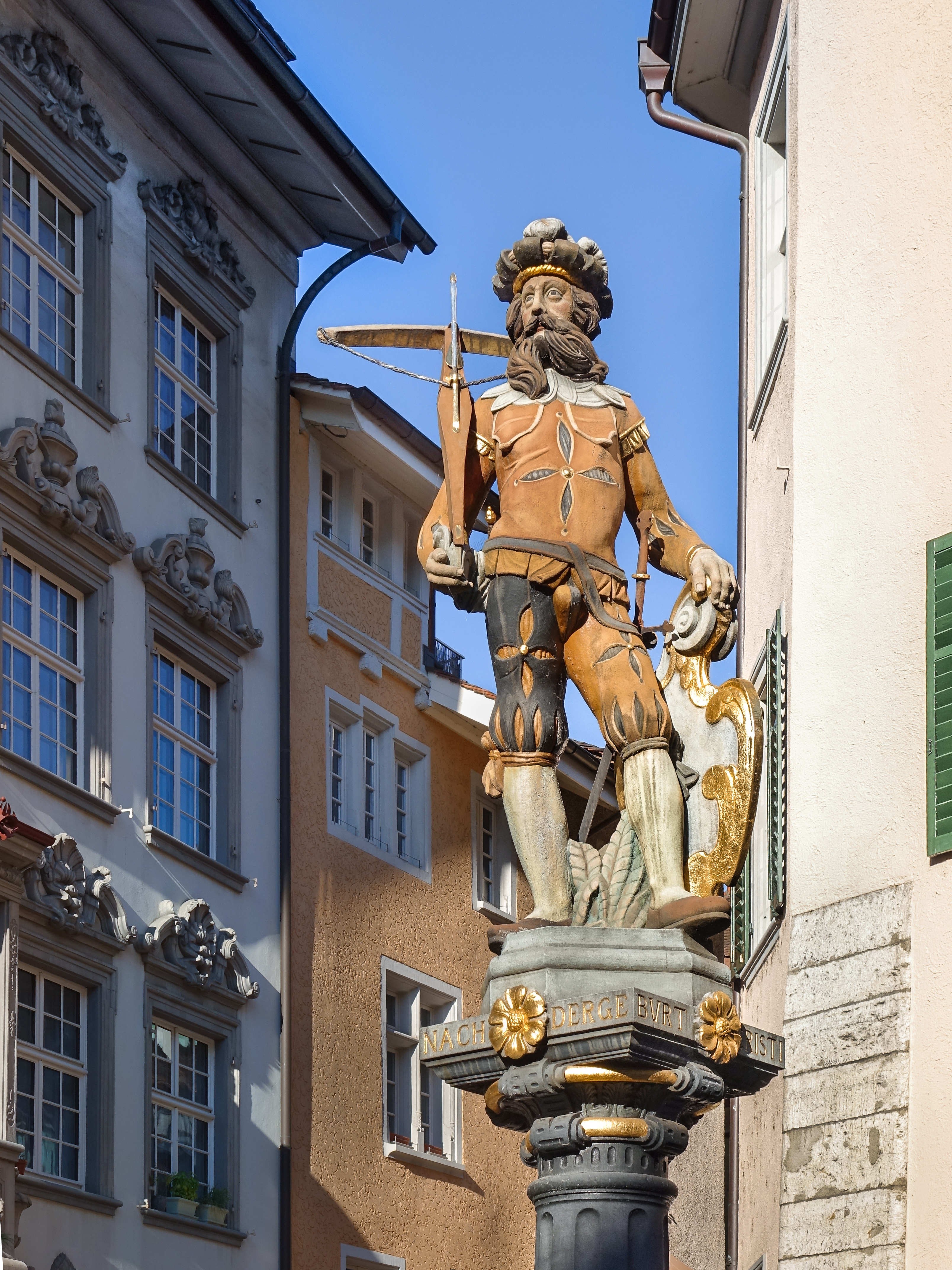 Wilhelm Tell. Tellenfigur und Säule. Tellenbrunnen in Schaffhausen.